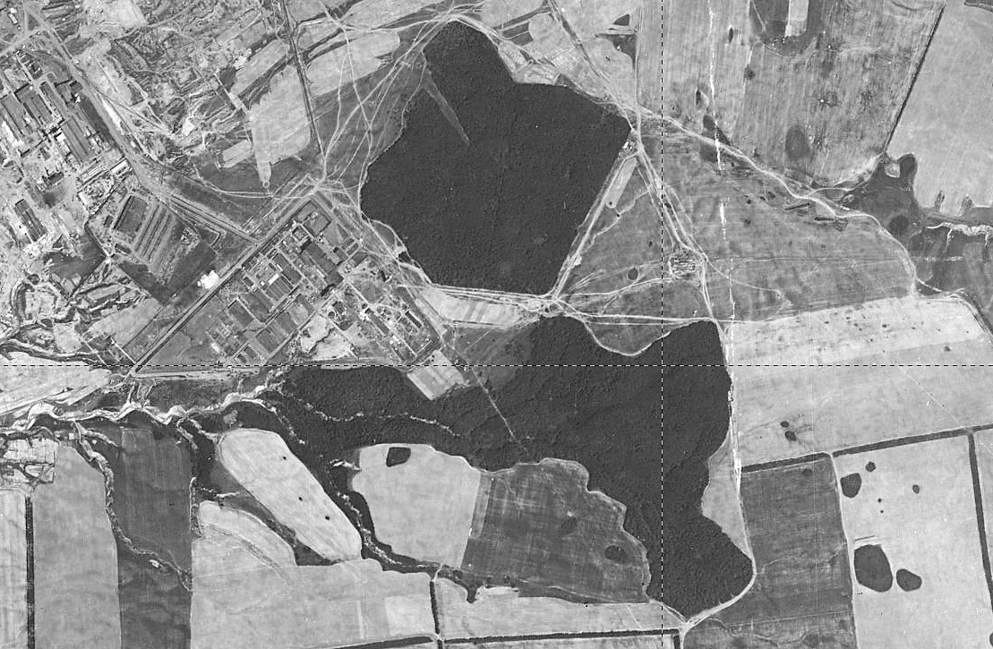 Казань. Горкинский лес и Ометьевский лес.